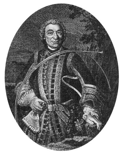 Marc-Antoine, marquis de Dampierre (d. 1756) french courtier and composer